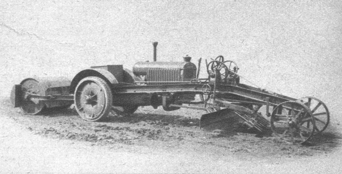 Mávag motoros útgyalu